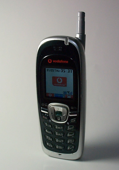 Mobile_phone_J-D07_Vodafone Japan